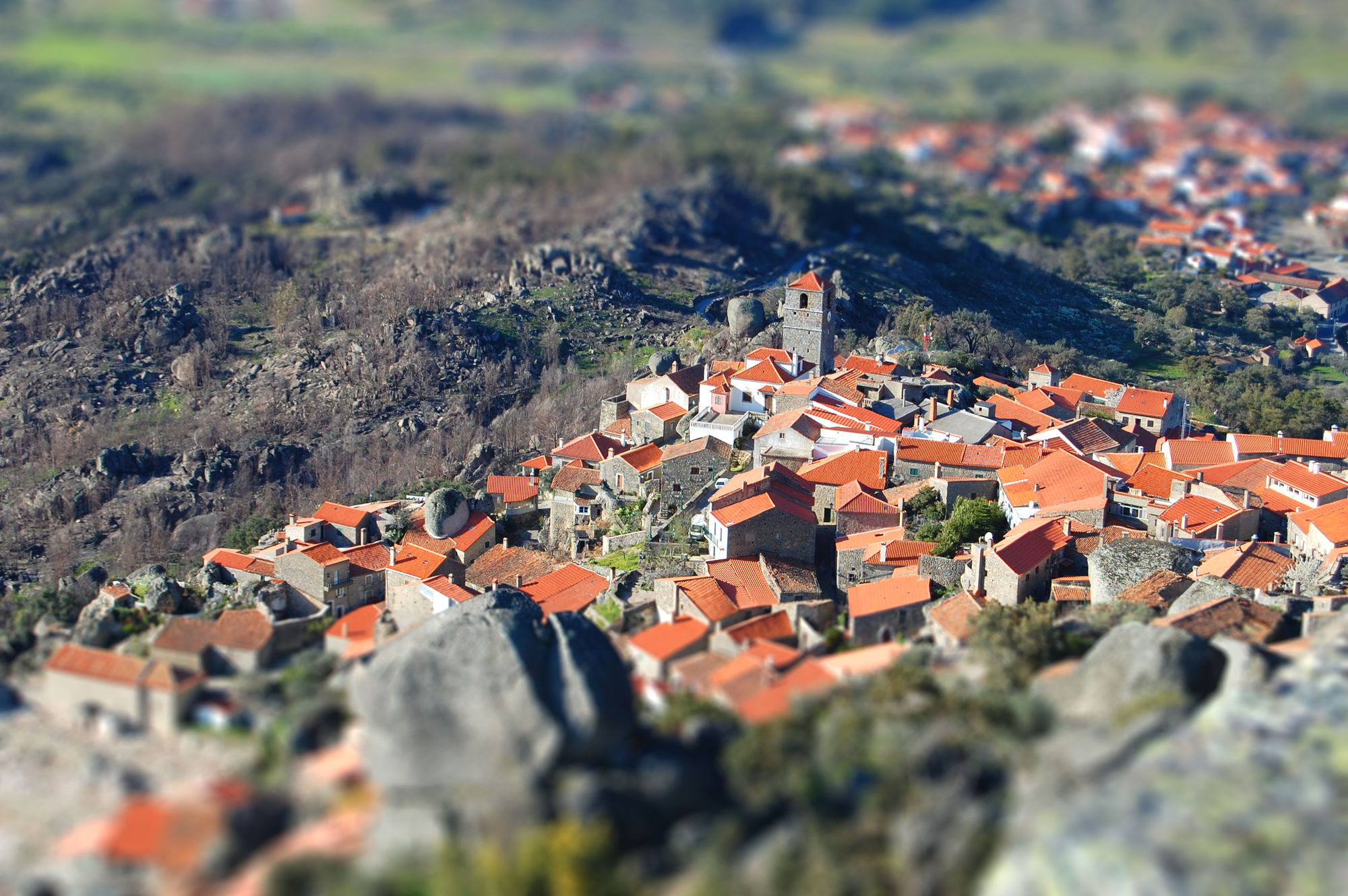 Monsanto Village